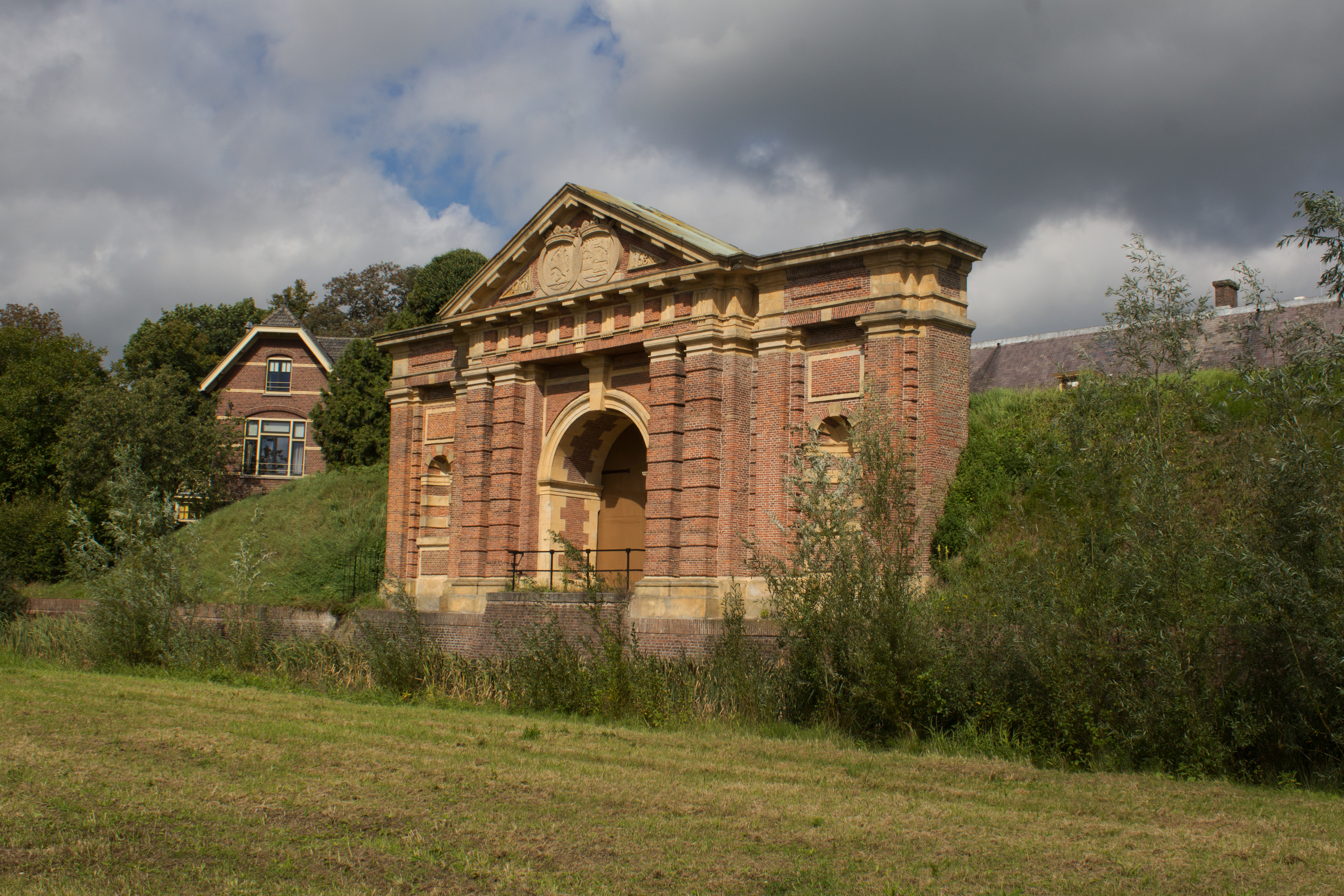 Hampoort, Grave